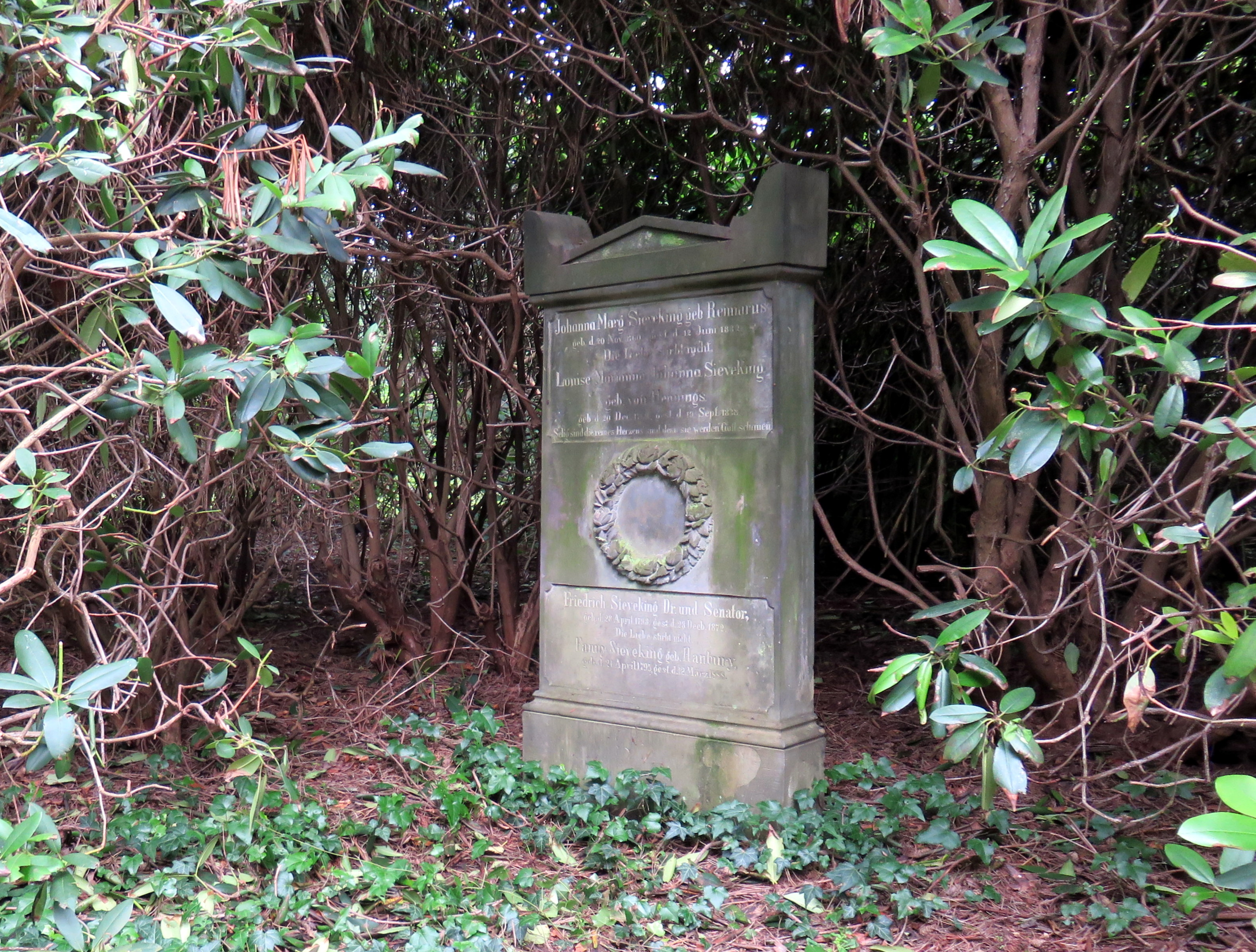 Grabstein für den Juristen und Ersten Bürgermeister Friedrich Sieveking (Sohn von Johanna Margaretha Sieveking und Georg Heinrich Sieveking) in der Sieveking-Familien-Grabanlage auf dem Hamburger Friedhof Ohlsdorf, Planquadrat S 25 / S 26. Details, Historisches Foto, Inschrift bei Eberhard Kändler: Begräbnishain und Gruft. Die Grabmale der Oberschicht auf den alten Hamburger Friedhöfen. Christians Verlag, Hamburg 1997, ISBN 3-7672-1294-3, S. 127.